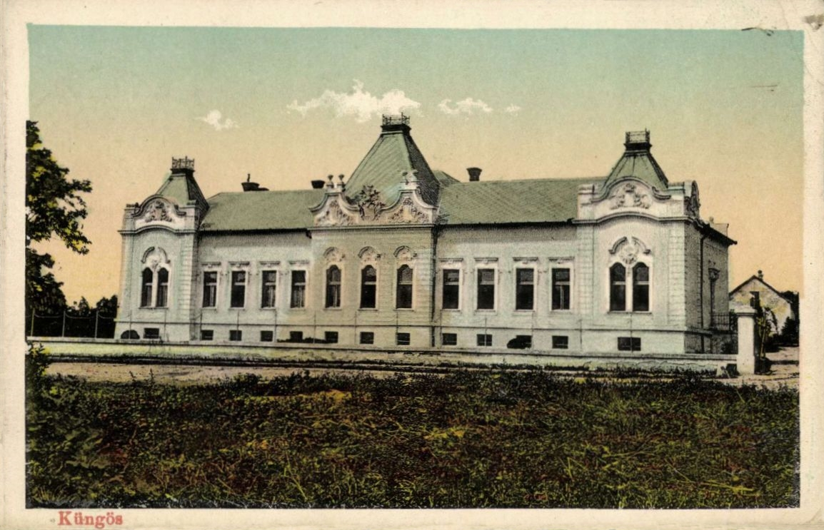 A küngösi kastély 1917-ben. A Küngösi kastély az 1700-as években épült, barokk stílusban, erről árulkodnak a barokk építészeti tulajdonságok is. Az itt megjelenített kép a kastélyt ábrázolja egy 1917-es képeslapon